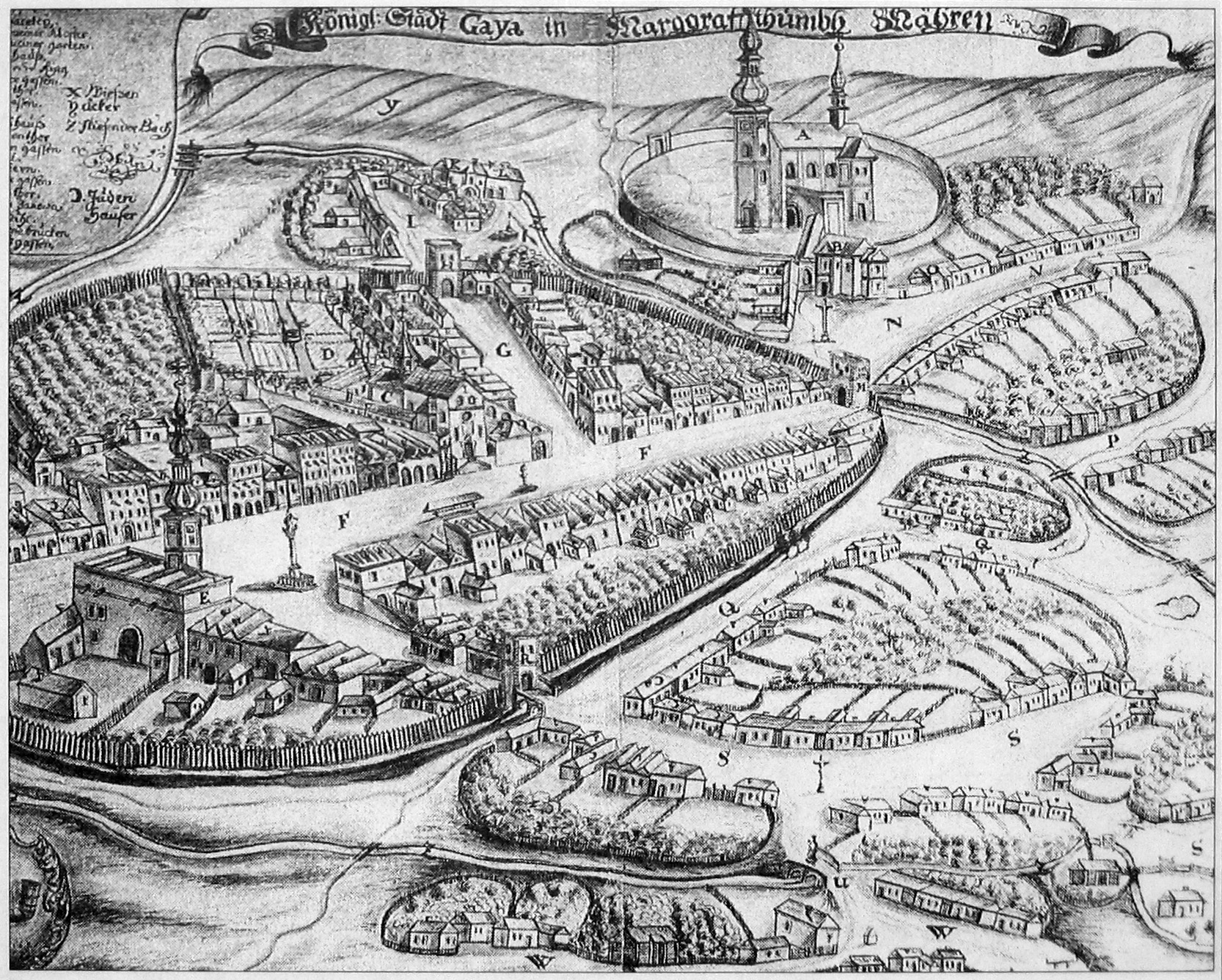 Město Kyjov v roce 1727